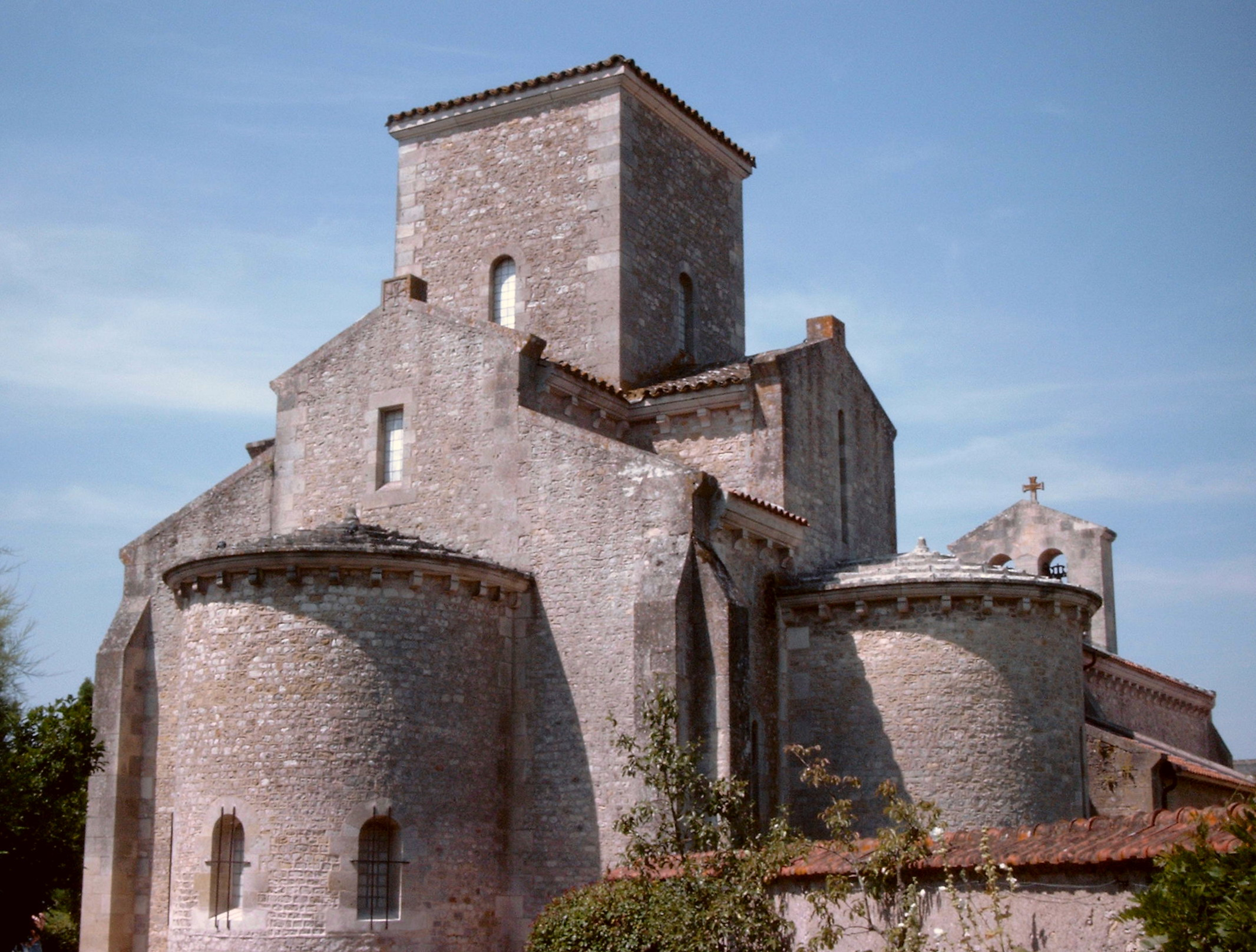 Germigny-des-Pres (Loiret)